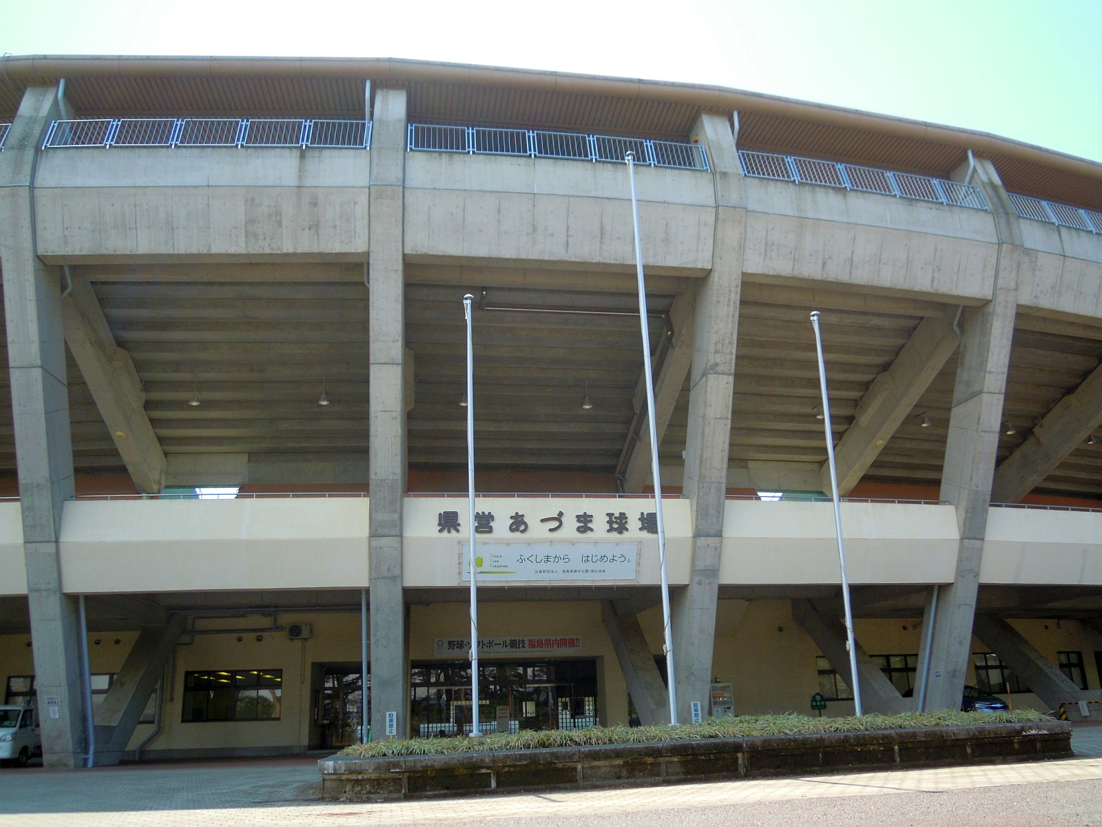 福島県福島市にある福島県営あづま球場外観を正面から